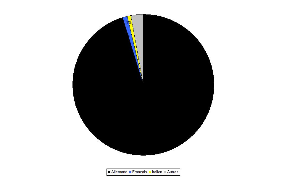 Langues parlées à Meikirch (Suisse)en 2000.